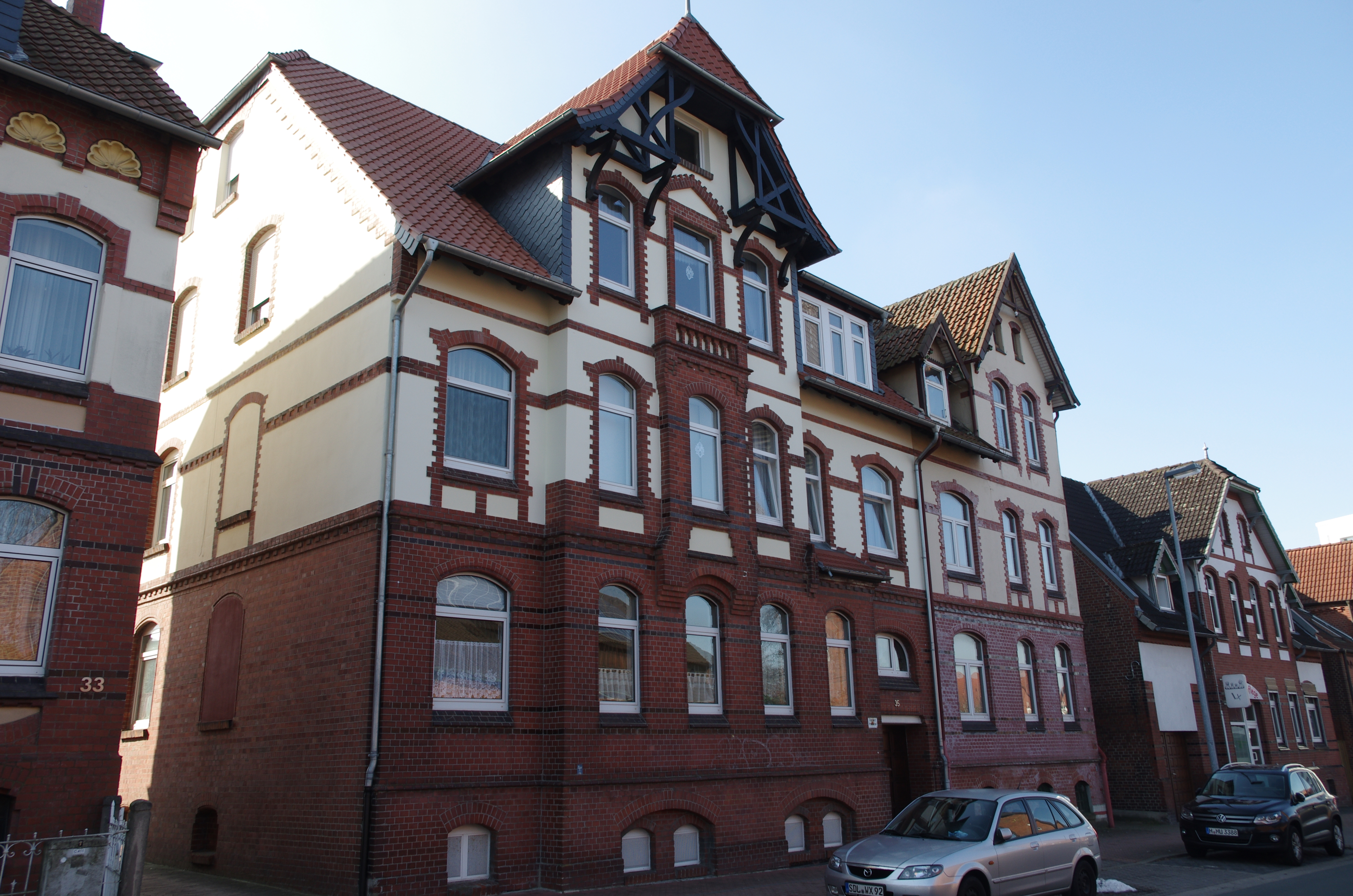 Laatzen in Niedersachsen. Das Haus Eichstraße 35 ist denkmalgeschützt.